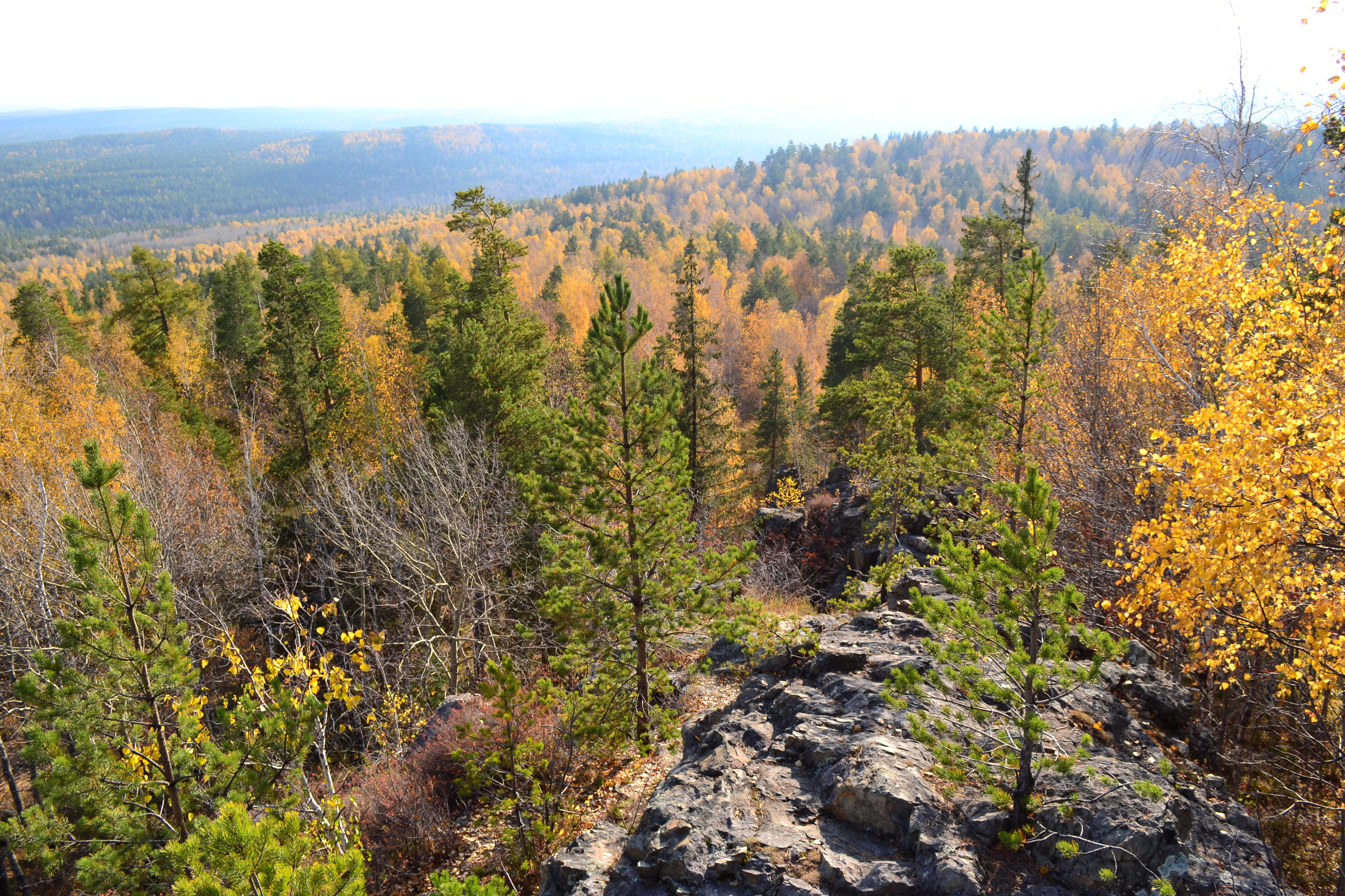 Гора "Азов", Полевской This image is related to the protected area of Russia number 6610536